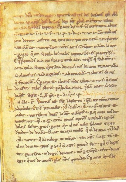 Seite aus den "Homilies d'Organyà"